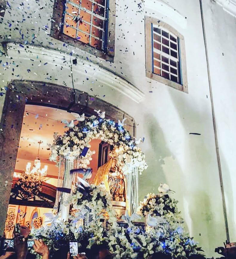 Procissão de Nossa Senhora de Nazareth, em Saquarema.